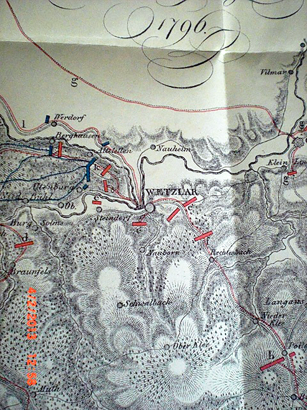 Ausschnitt aus der Karte zum Buch " Grundsätze der Strategie " von Erzherzog Carl von Österreich